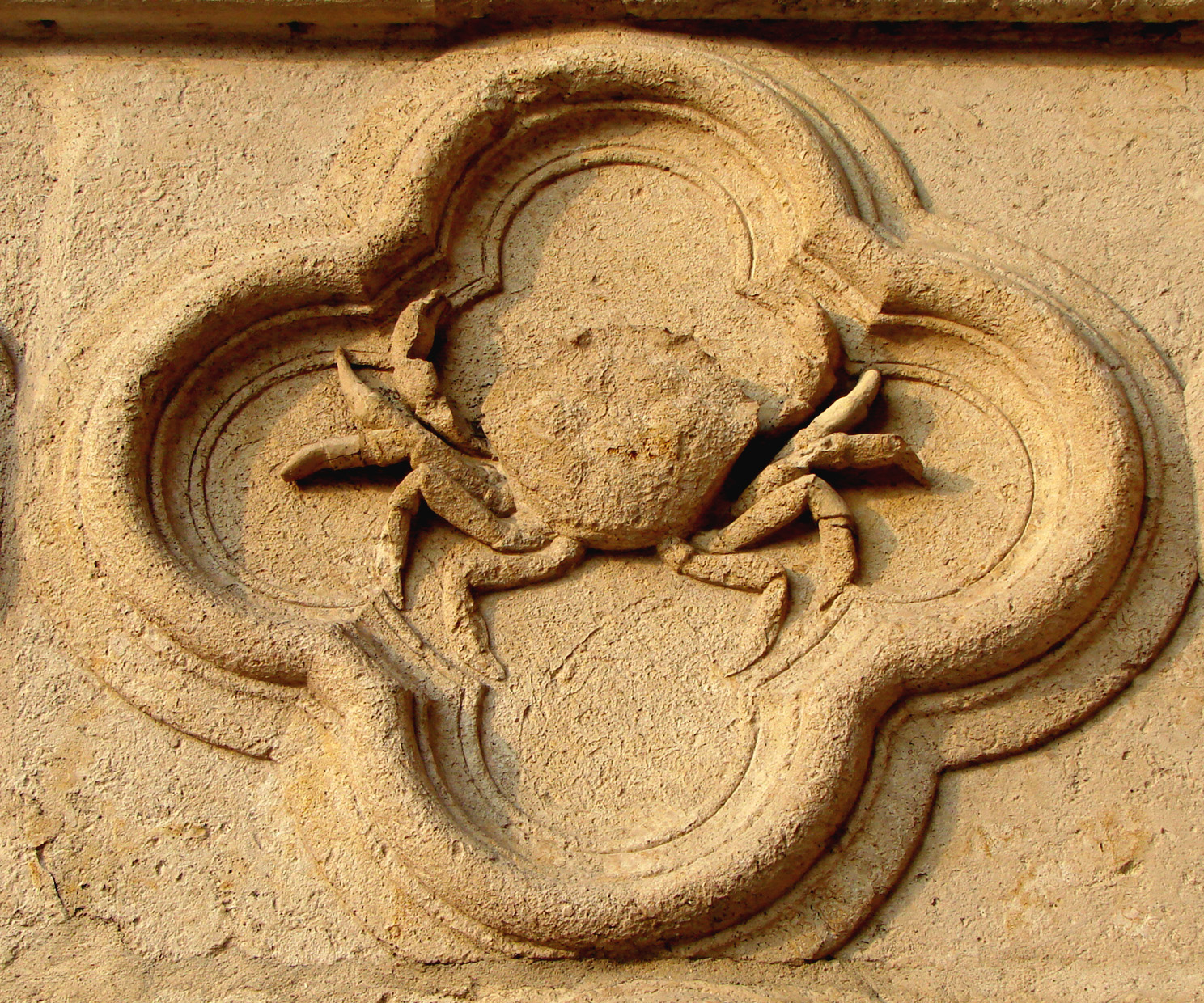 Le cancer (Cancer) ;un des signes du zodiaque complet figurant sur le portail gauche de la façade de la cathédrale d'Amiens.